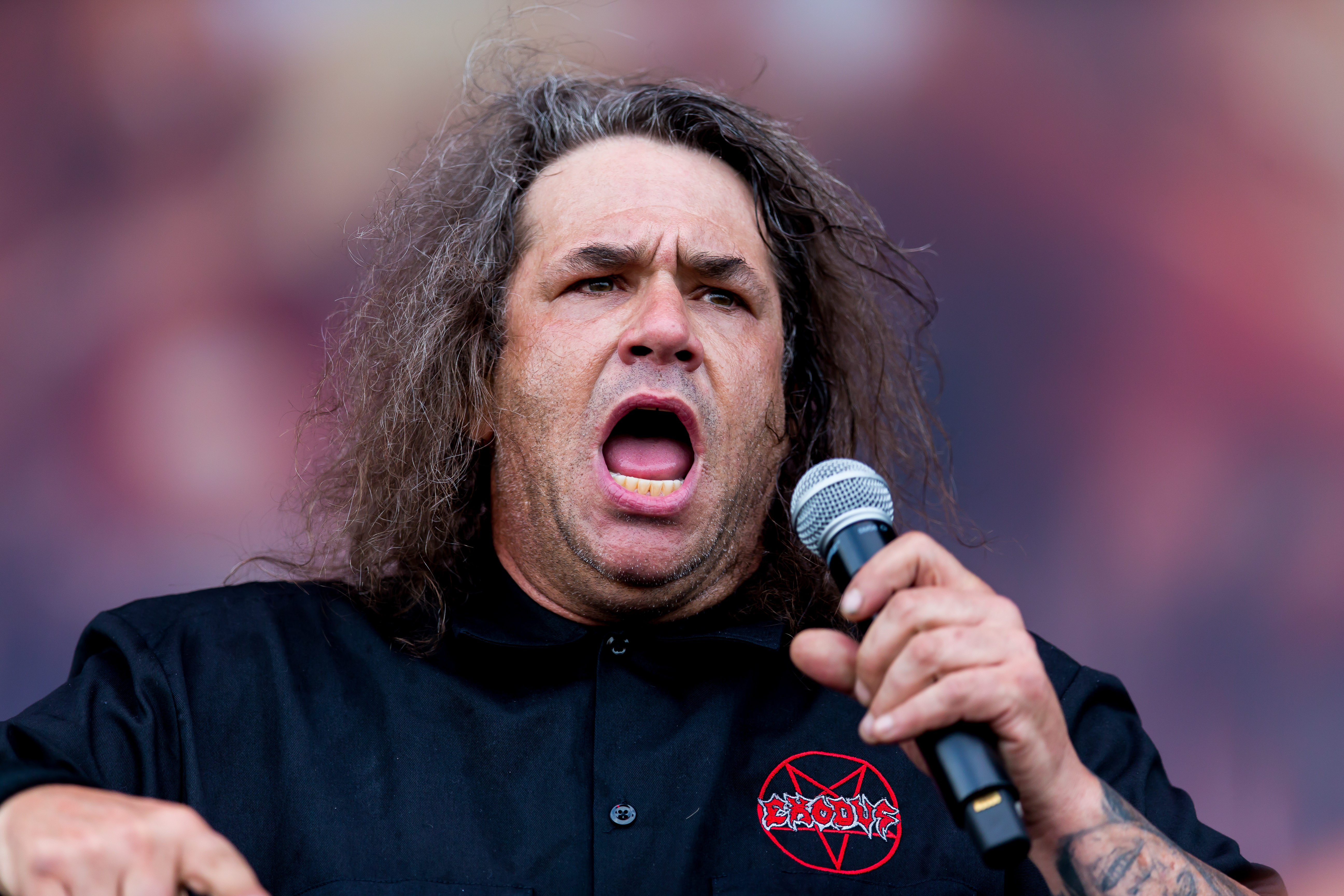 Exodus during Summer Breeze 2016 at , Dinkelsbühl, Bayern, Germany on 2016-08-18, Photo: Sven Mandel